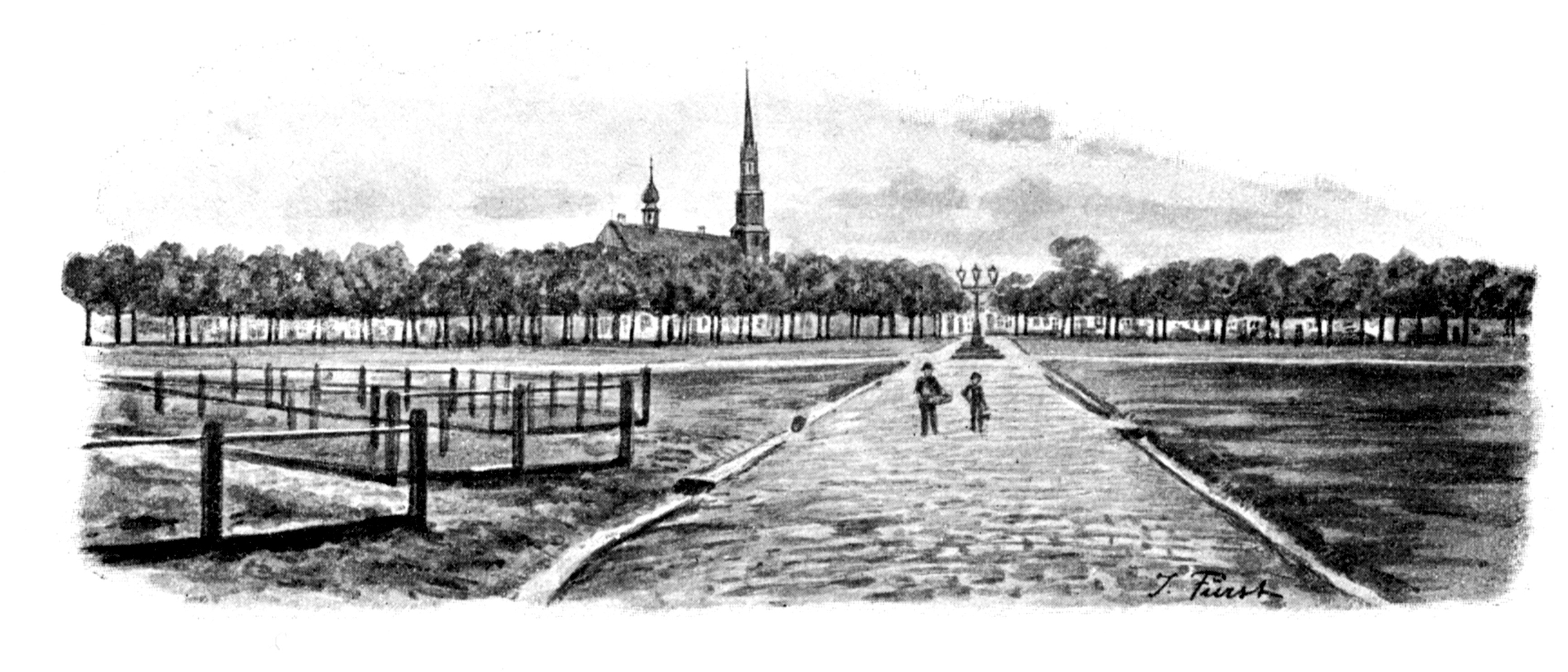 Der Marktplatz in Heide, Zeichnung von Julius Fürst um 1895